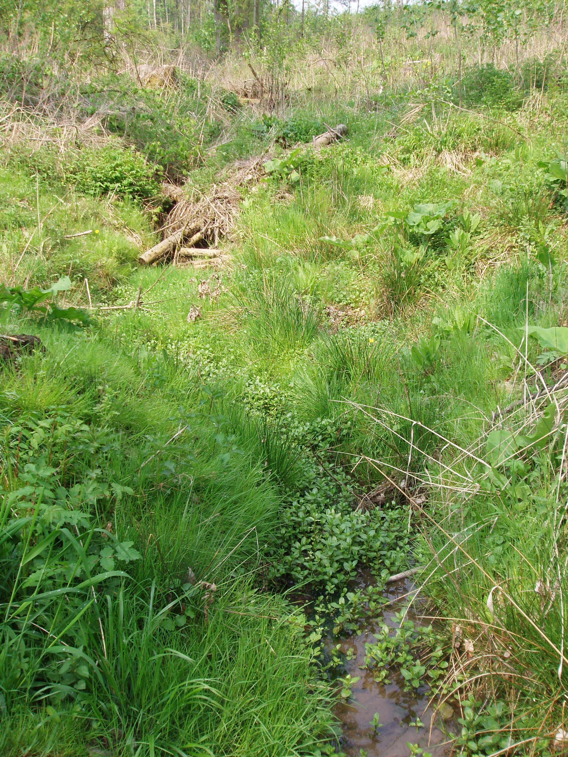 Milzquelle